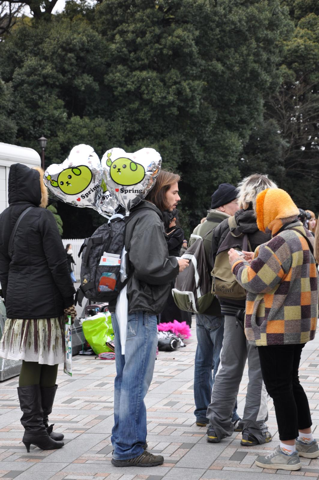 Tokyo_20100328_041